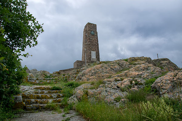 Паметника на връх Шейновец